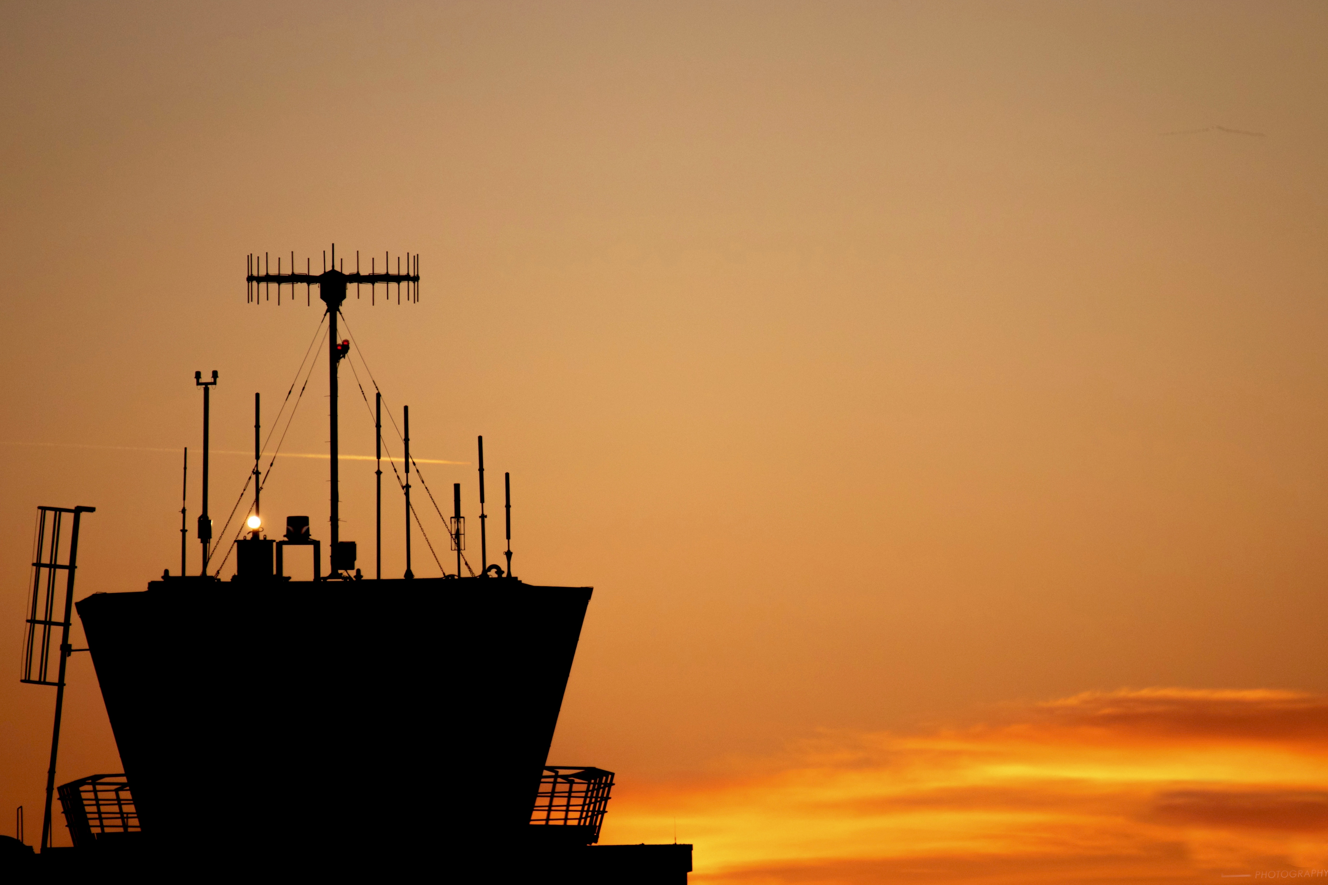 Der Tower des Flughafens Paderborn in der Abenddämmerung.